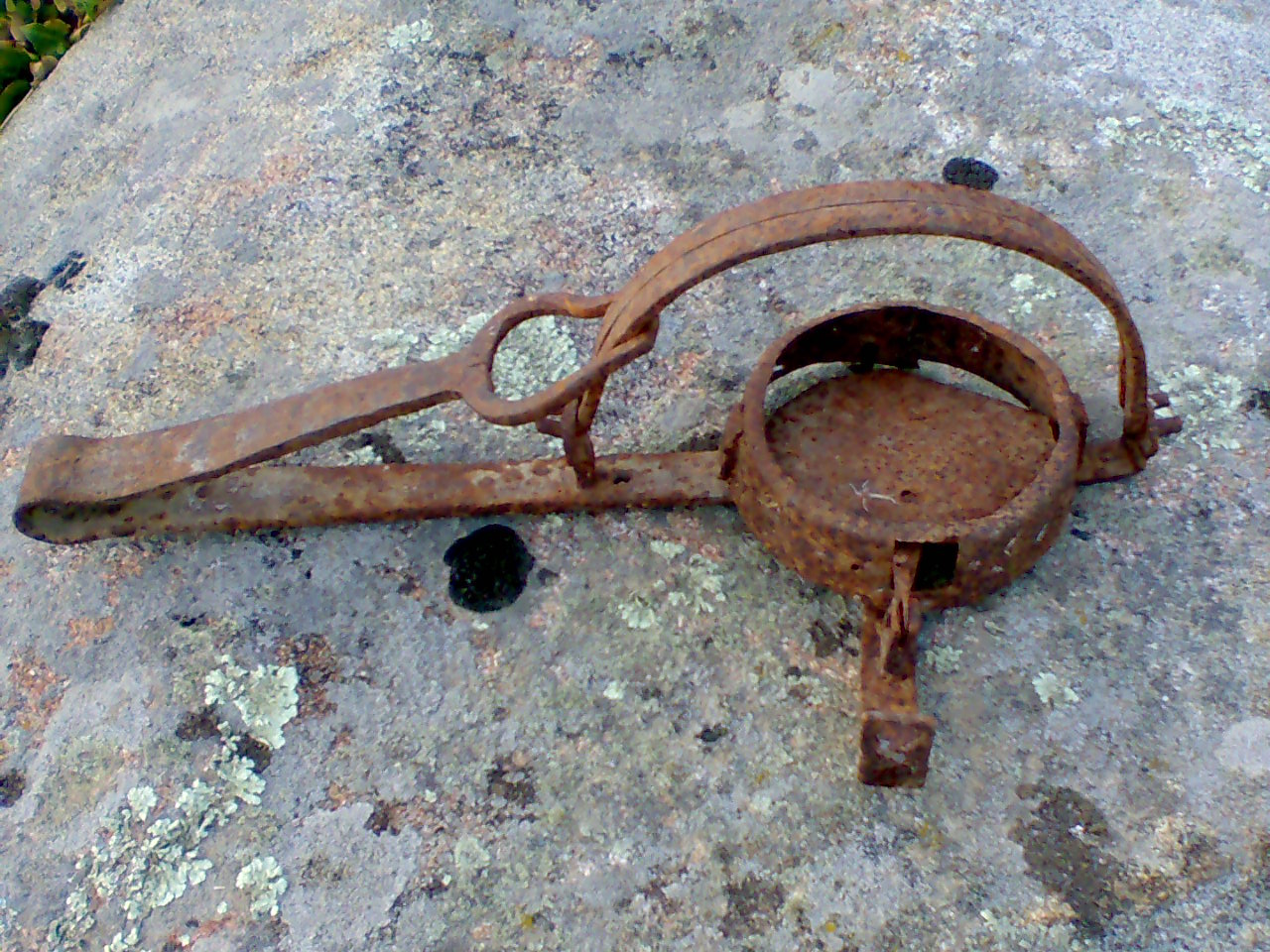 Cepo o trampa viejo usado para cazar zorros o incluso jabalies